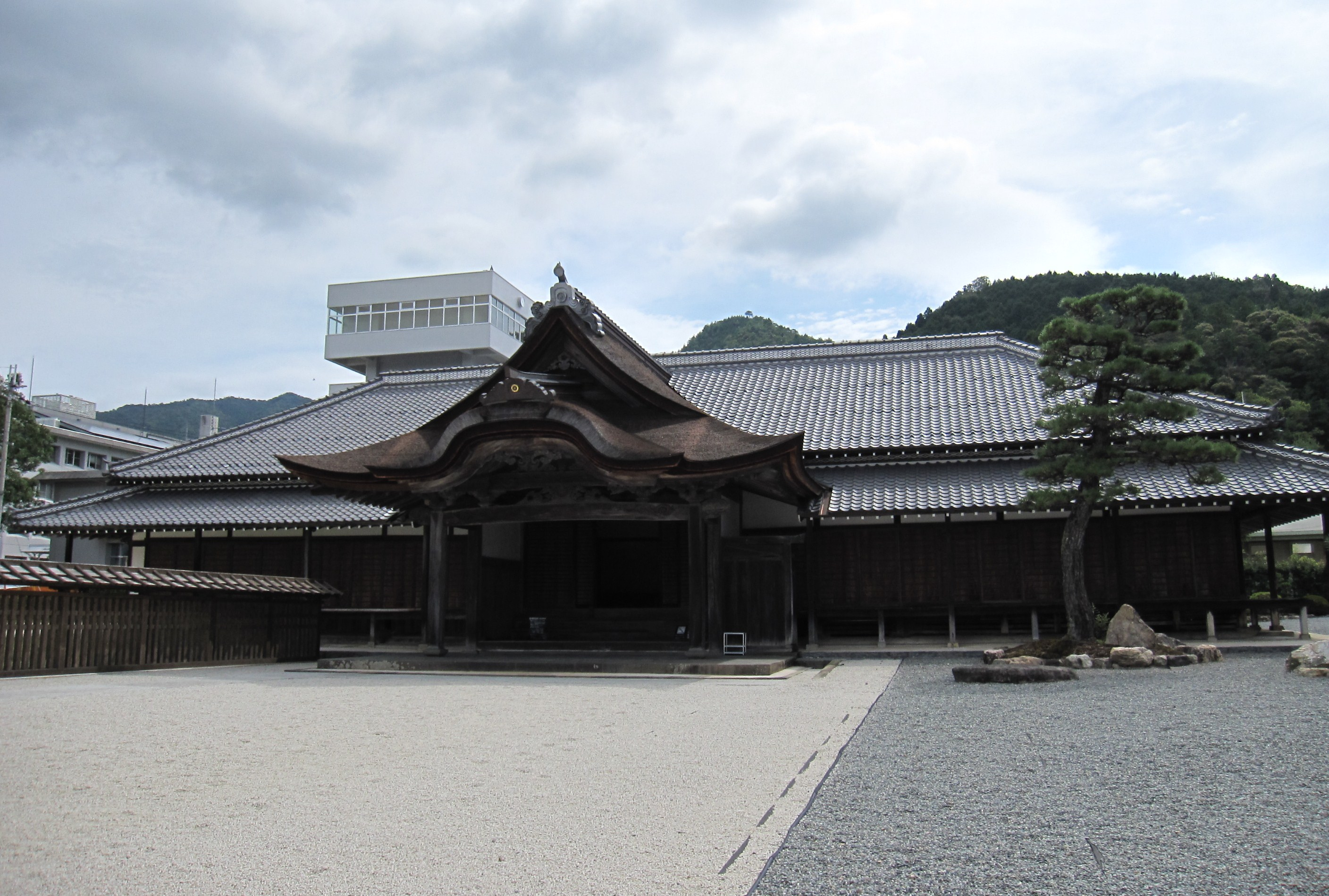 柏原藩陣屋跡